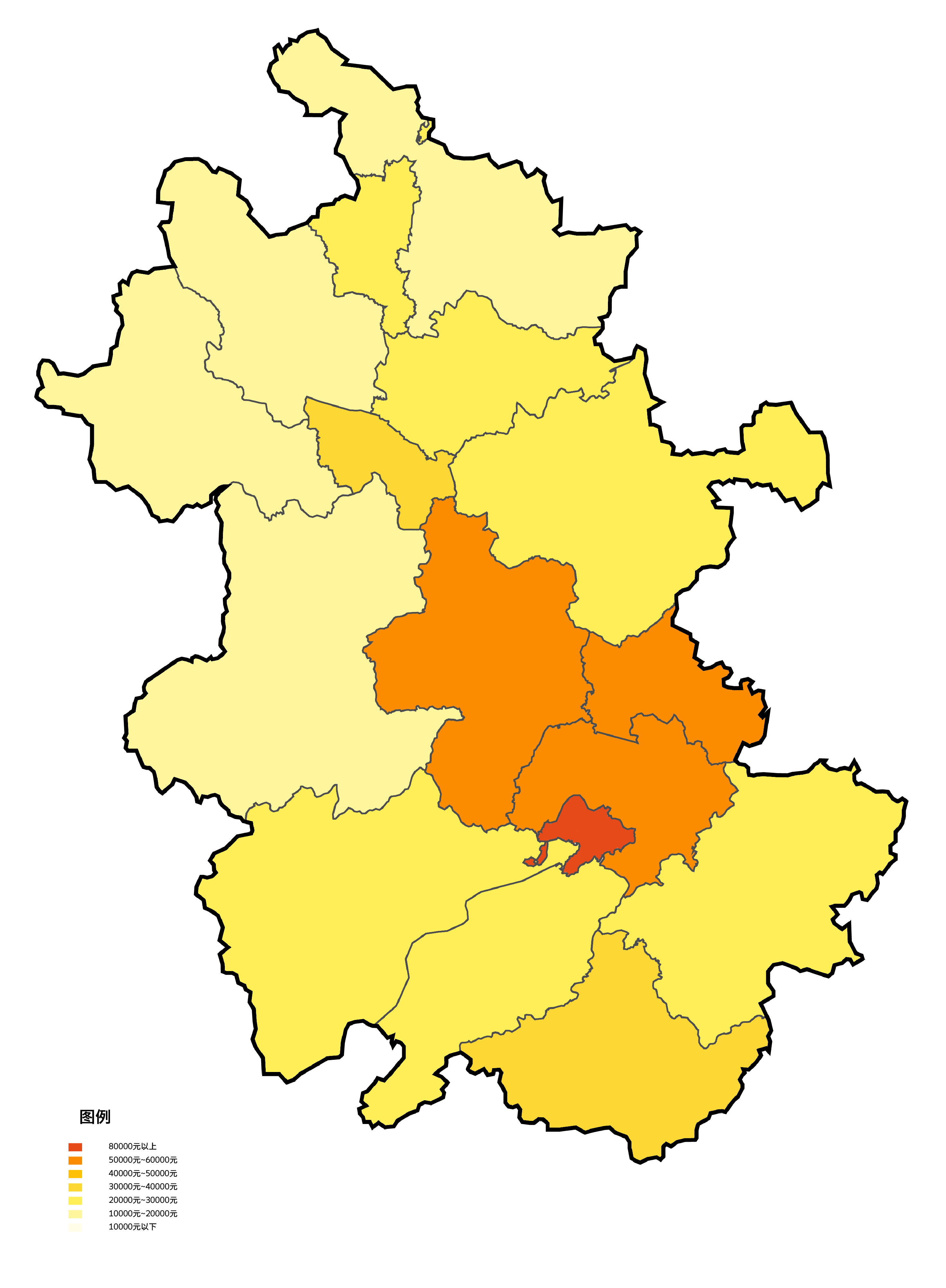 中文（中国大陆）: 安徽省各地级市根据2012年地区生产总值填色地图